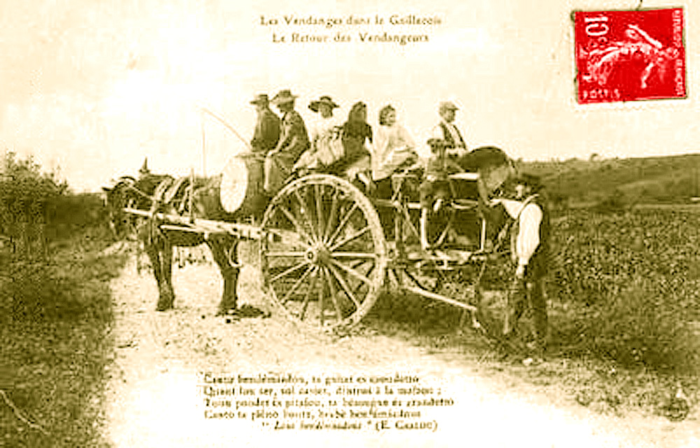 Gaillac retour des Vendanges